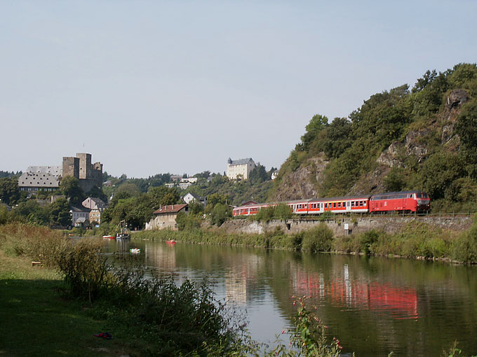 Einen herrlichen Ausblick auf die vielbepaddelte Lahn konnten die Reisenden der RB 22431 am 12.08.2003 genießen, als 218 398 den Zug nach dem Halt in Runkel wieder lautstark beschleunigte (Lahntalbahn)